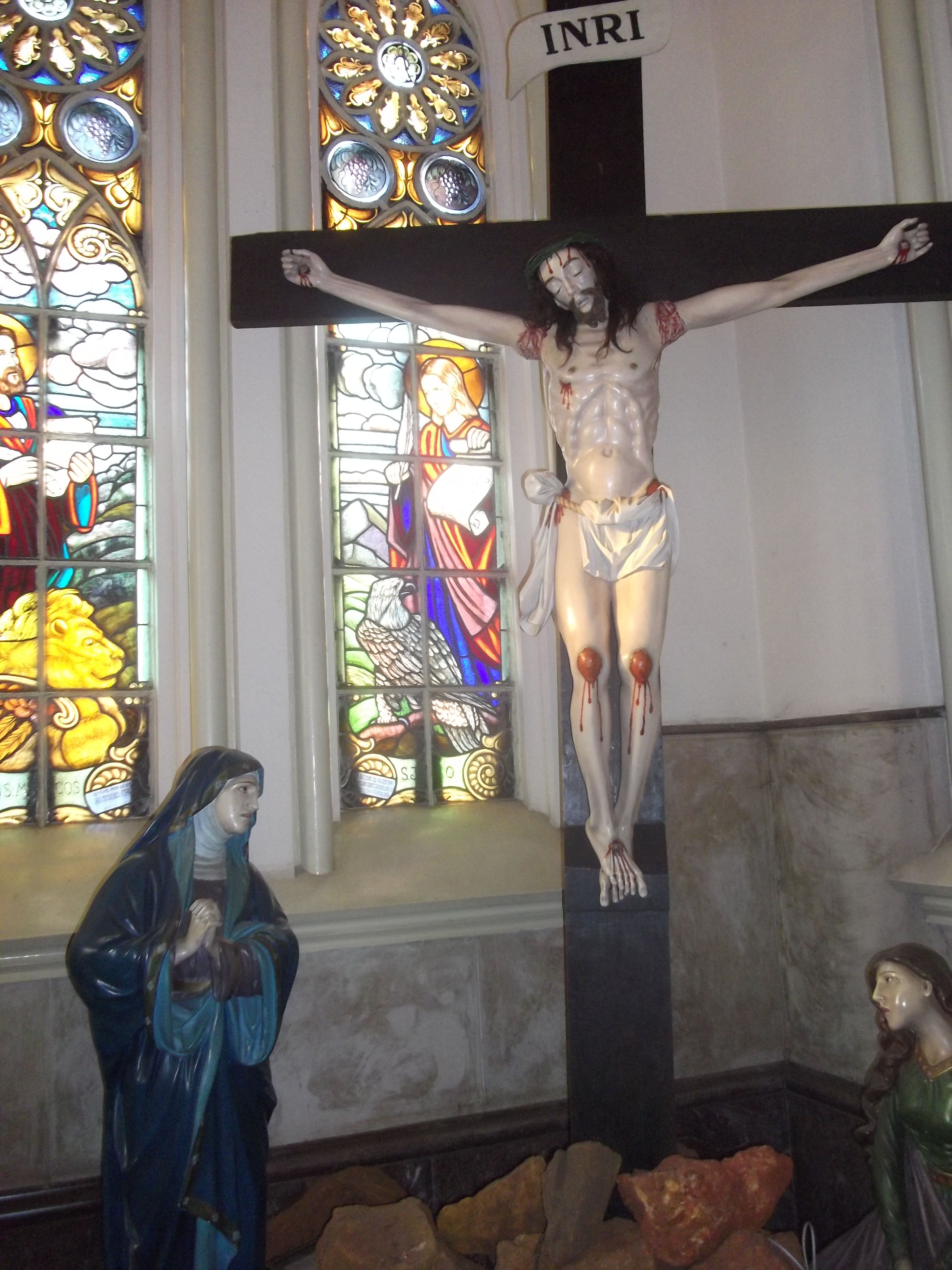 Catedral da Boa Viagem, Belo Horizonte